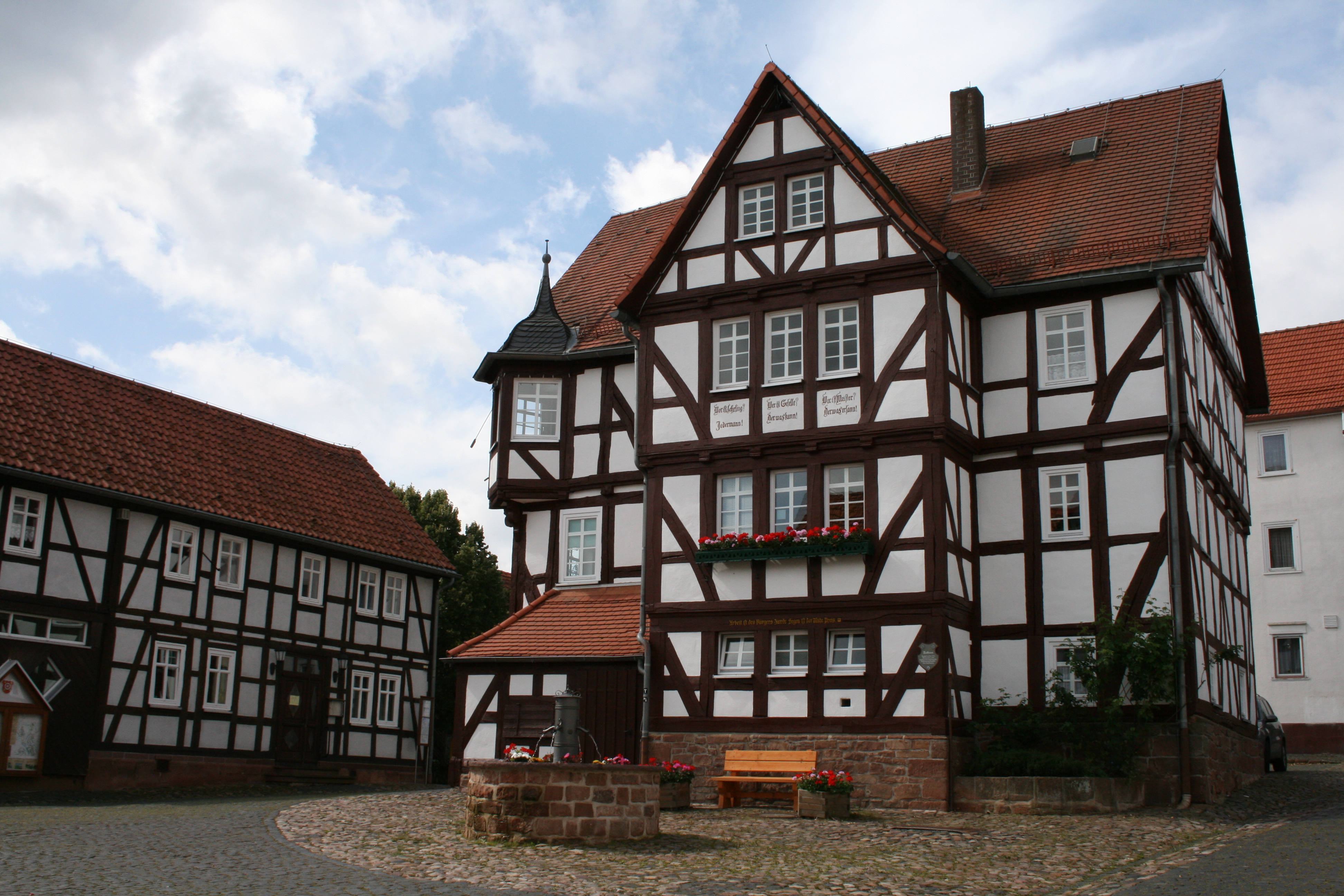 Rathaus in 35119 Rosenthal, Deutschland, Adresse: Am Rathaus 2